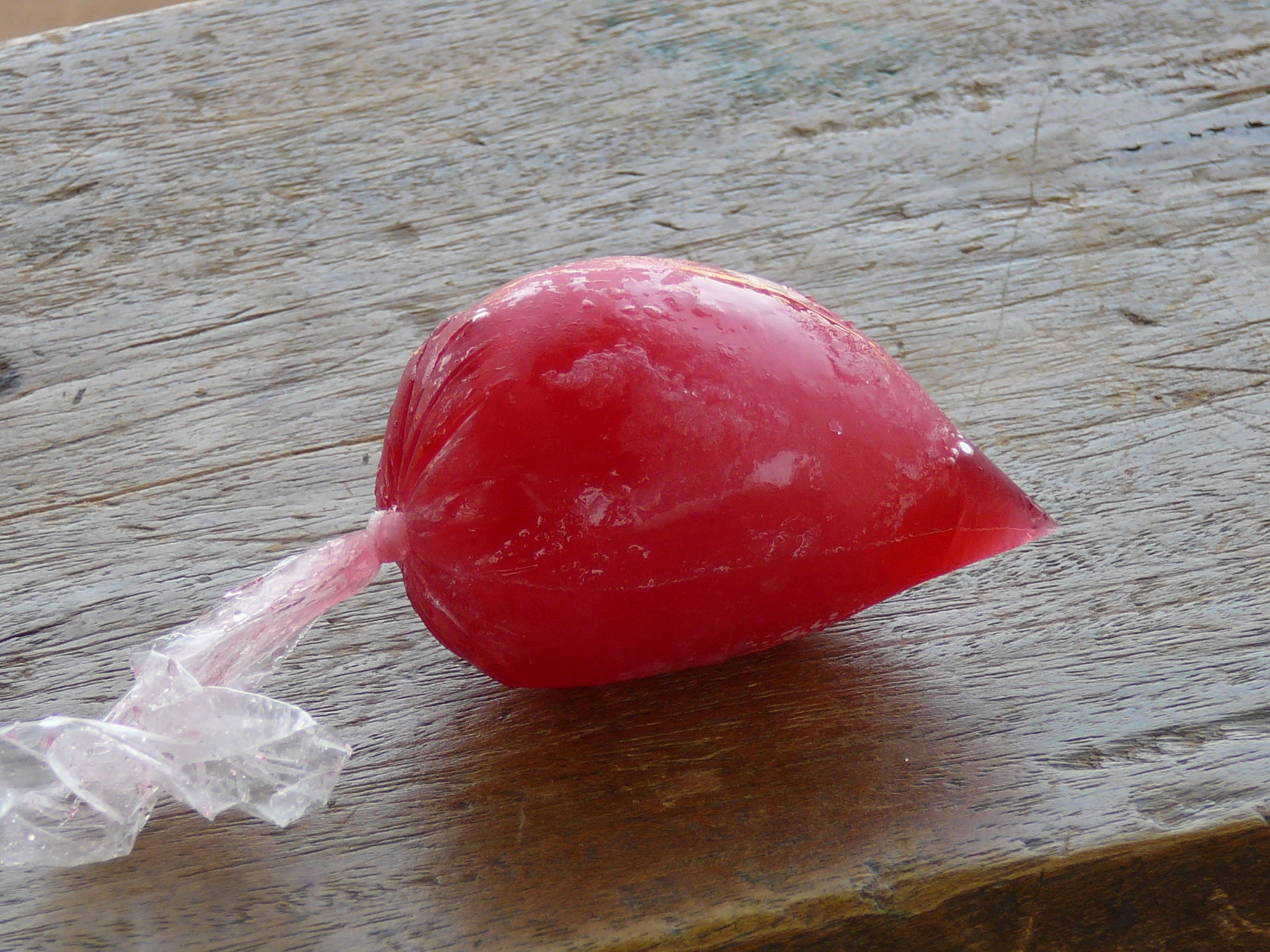 Wonjo-Eis, getrocknete Hibiscus sabdariffa-Blüten als Aufgussgetränk gefroren und in dieser Form als Speiseeis verkauft